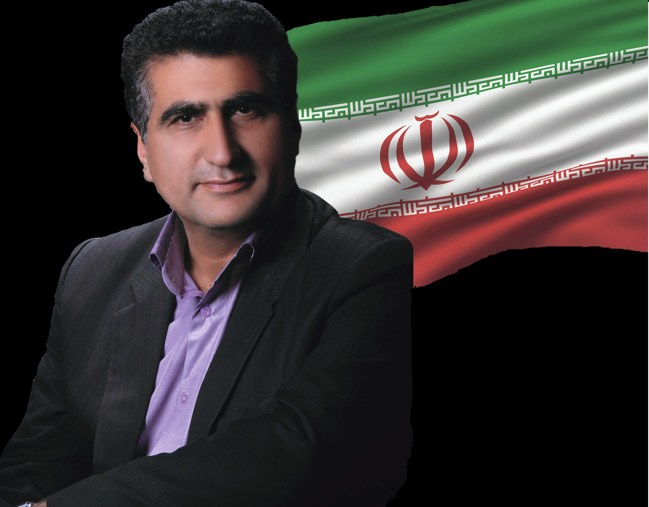 علی اصغر موسی پسندی